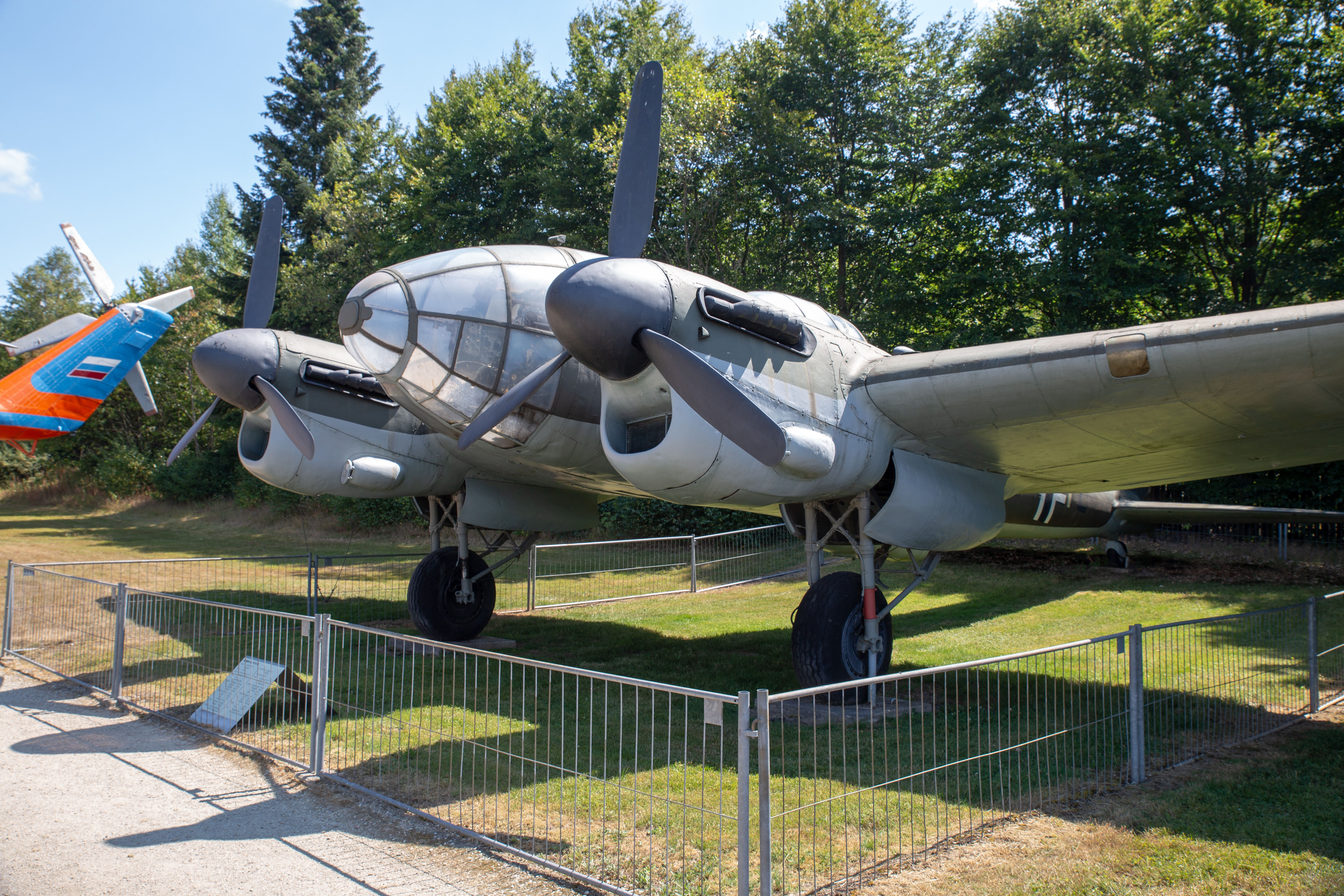 CASA B2.111 (Heinkel He-111)